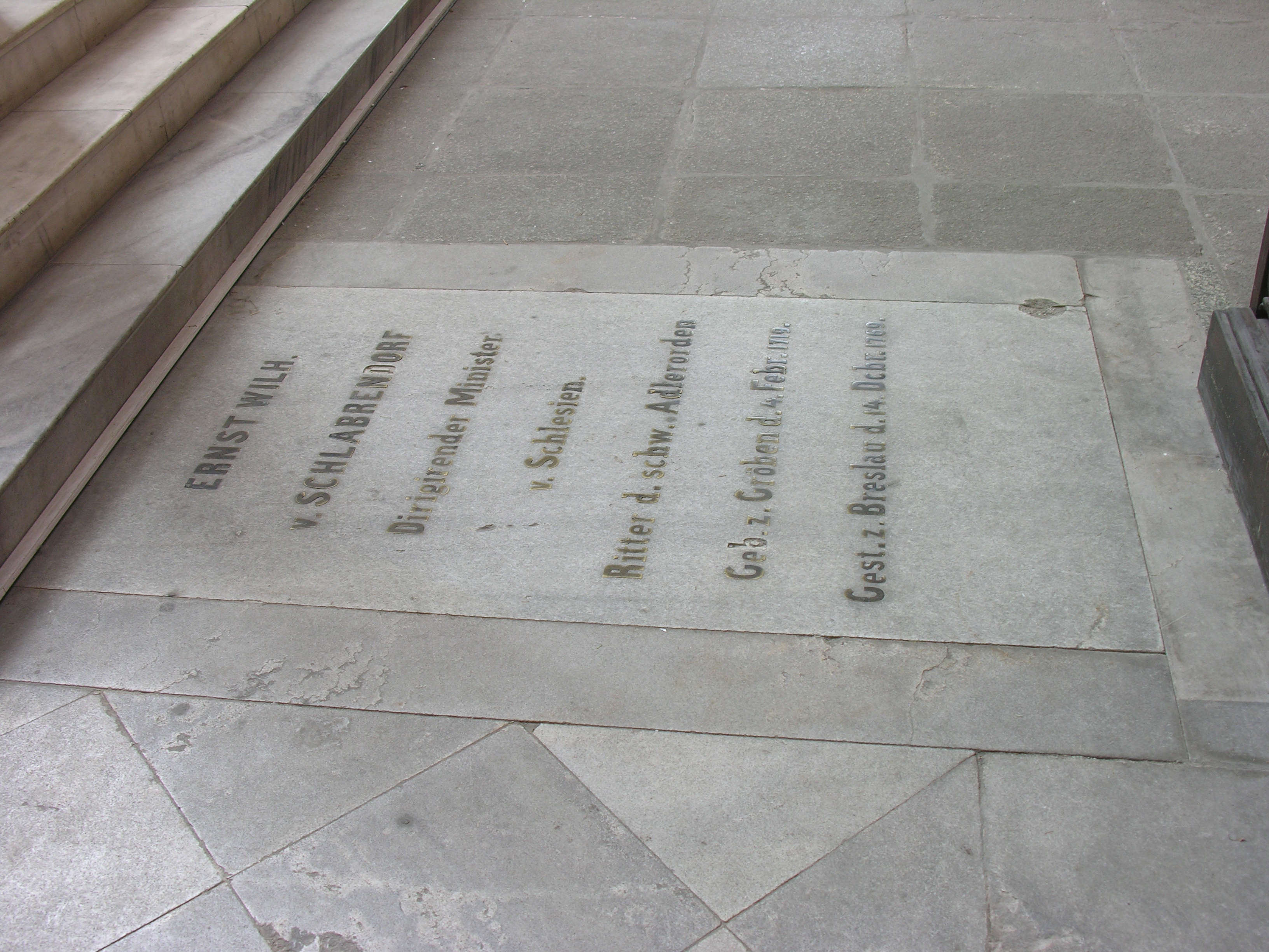 Nagrobek Ersta Wilhelma von Schlabrendorfa w kościele św. Elżbiety (garnizonowym) we Wrocławiu